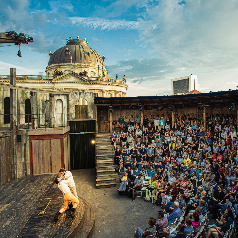 Foto vom Inneren des Monbijou Theater Amphitheaters ca. 2014 von Bernd Schönberger